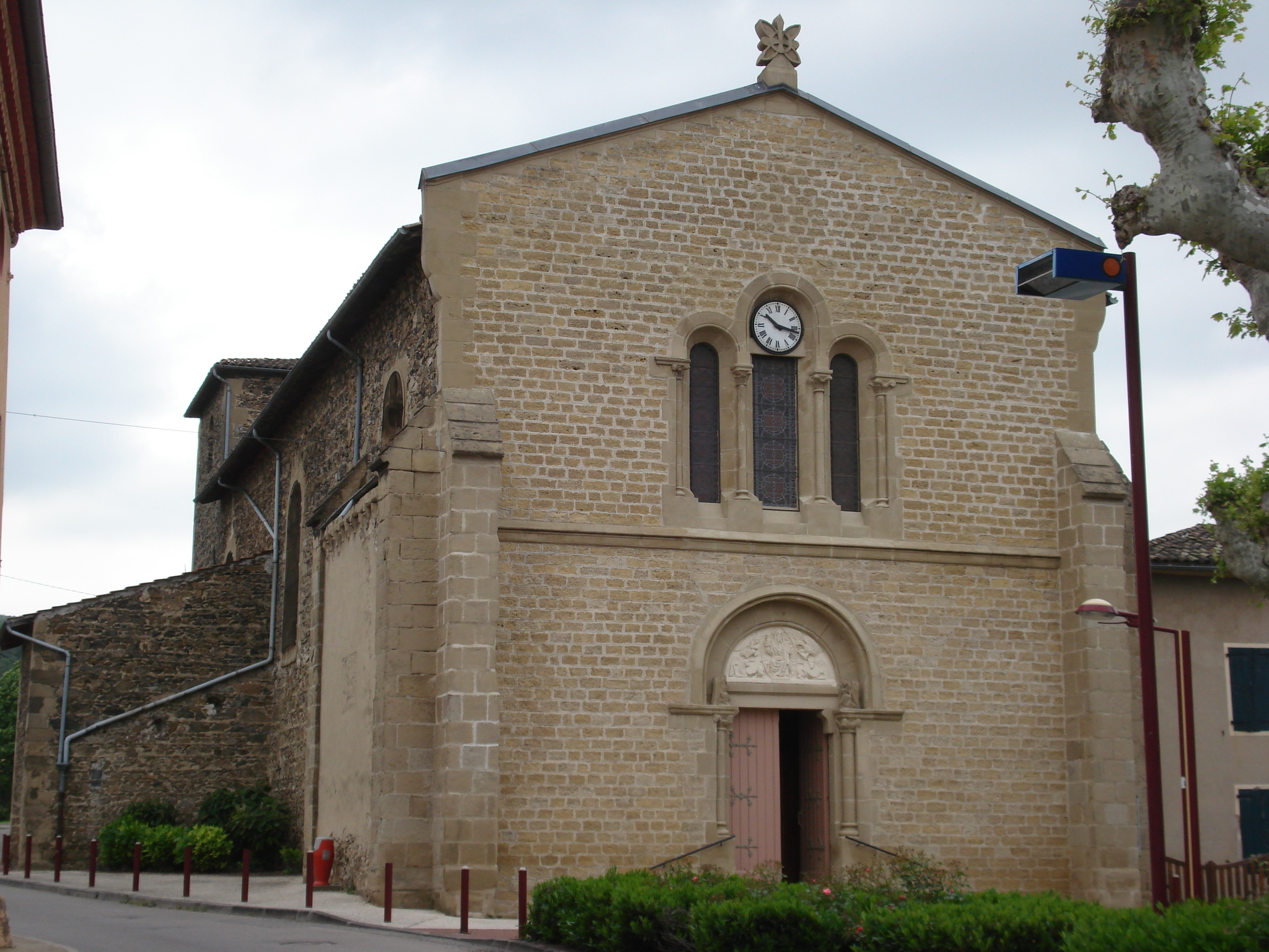 église de Beausemblant dans la Drôme